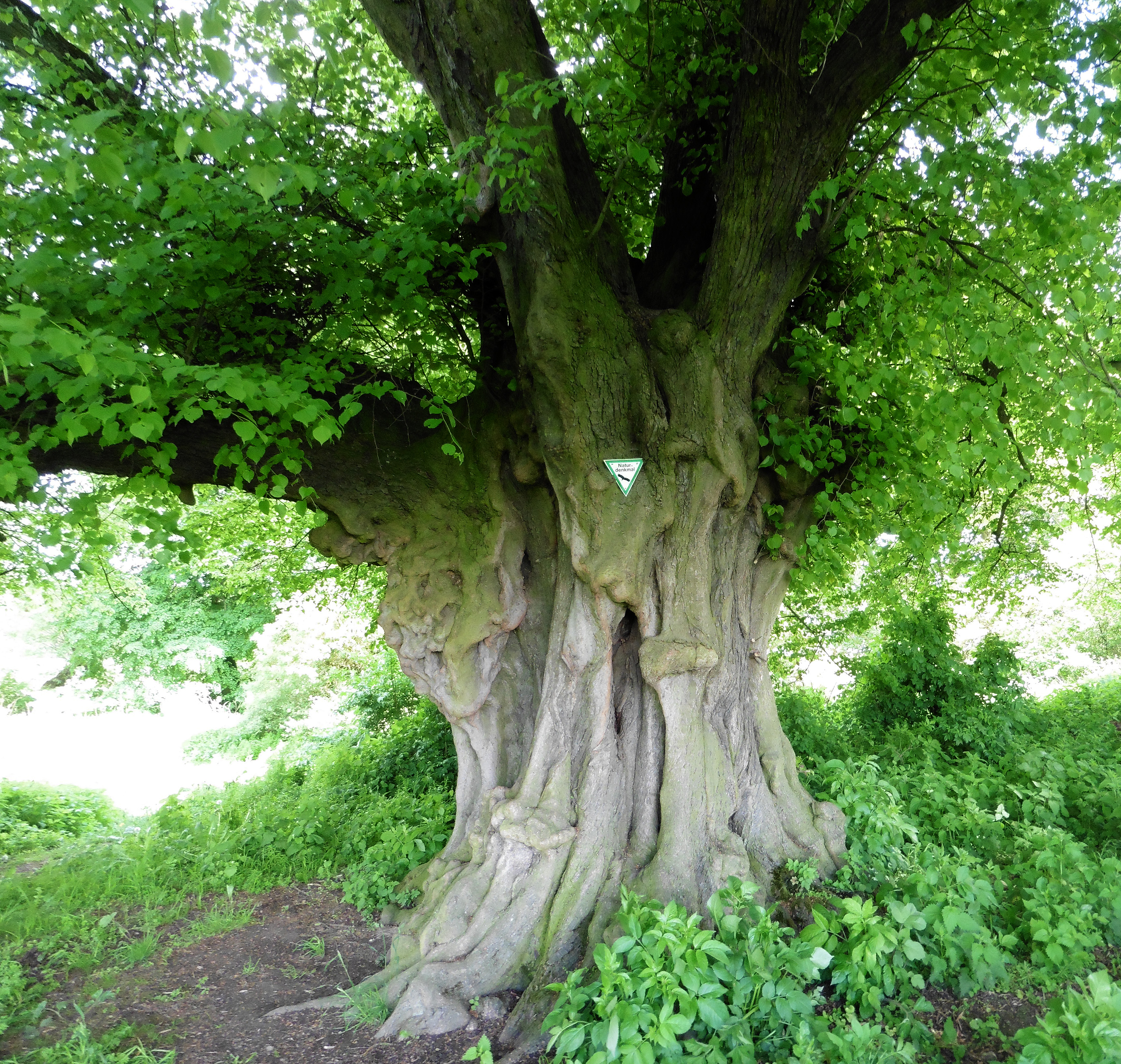 Alte Linde (Naturdenkmal) an der alten Schafstränke bei Nieder-Ofleiden. Ansicht von Westen.